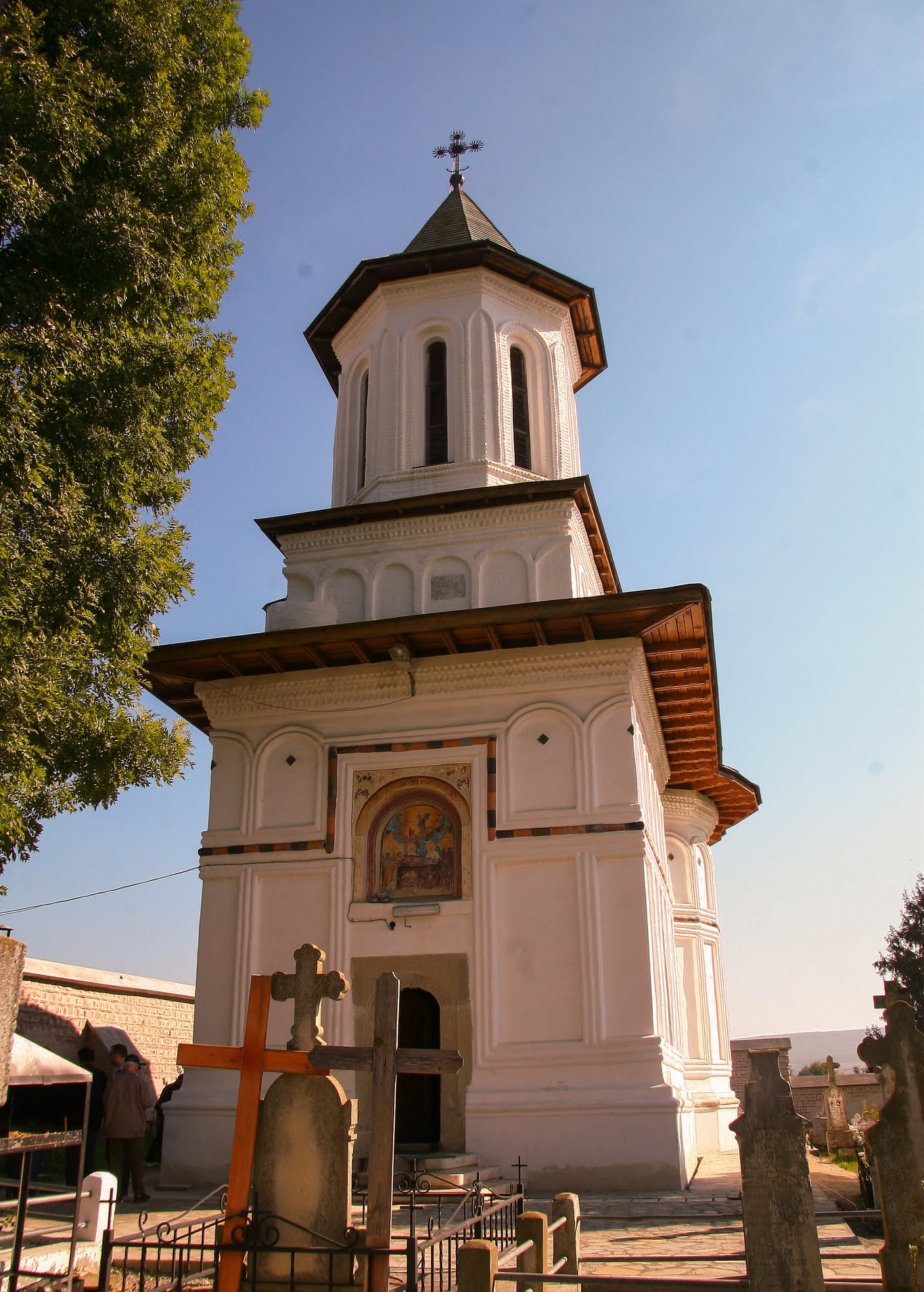 Biserica „Adormirea Maicii Domnului” (1666) sat Băjești; comuna Bălilești 01